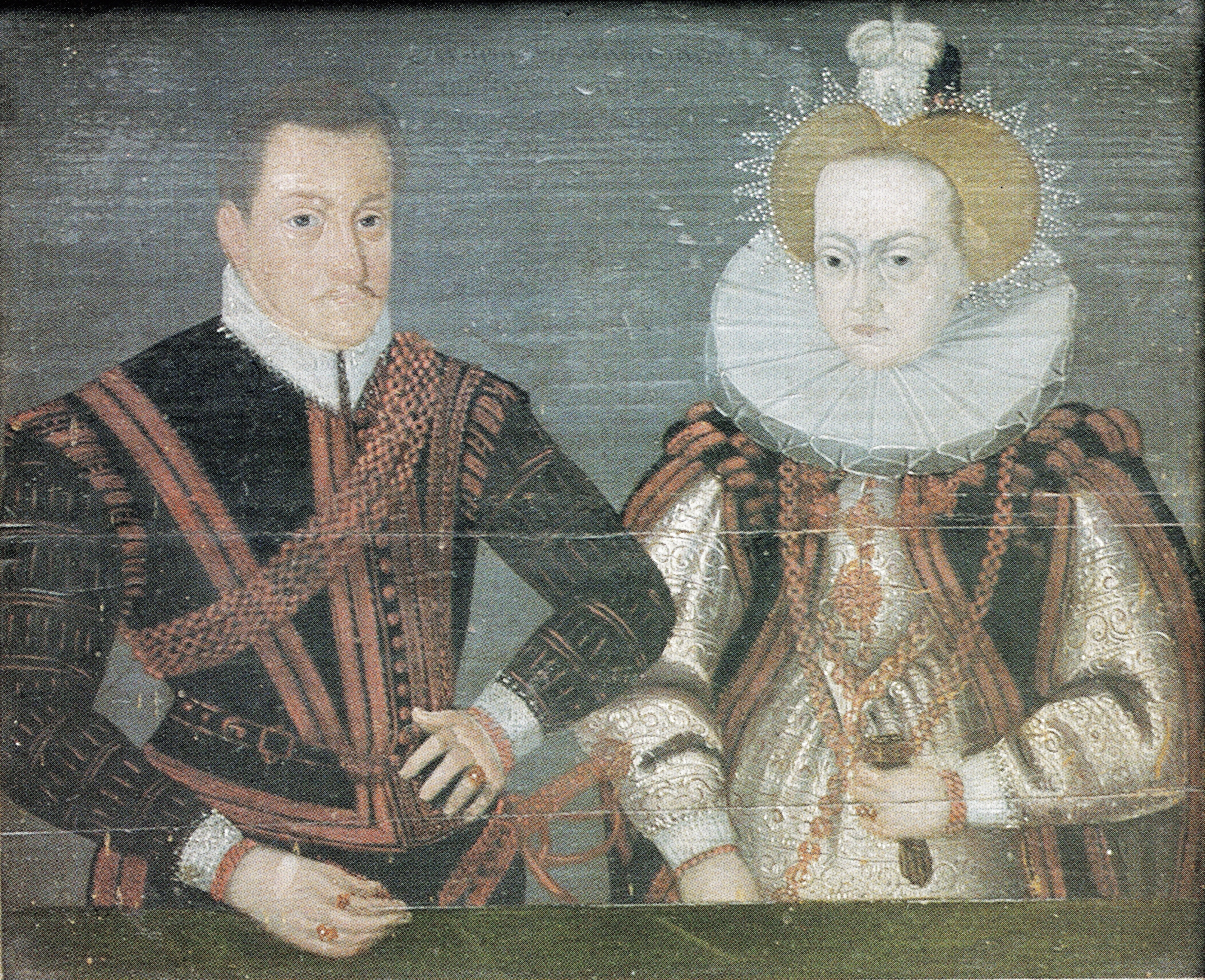 Ölgemälde von Herzog Bogislaw XIV. von Pommern und seiner Gemahlin Elisabeth von Schleswig-Holstein-Sonderburg.